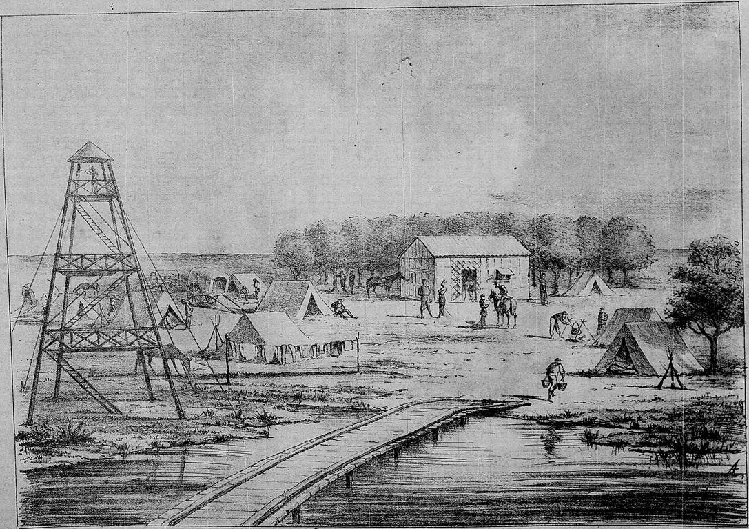 Barraca e mangrulho do Exm. Sr. Marquez de Caxias em Parê-cuê, conforme um desenho que fomos obsequiados pelo distinto Coronel de Engenheiros José Joaquim Rodrigues Lopes.